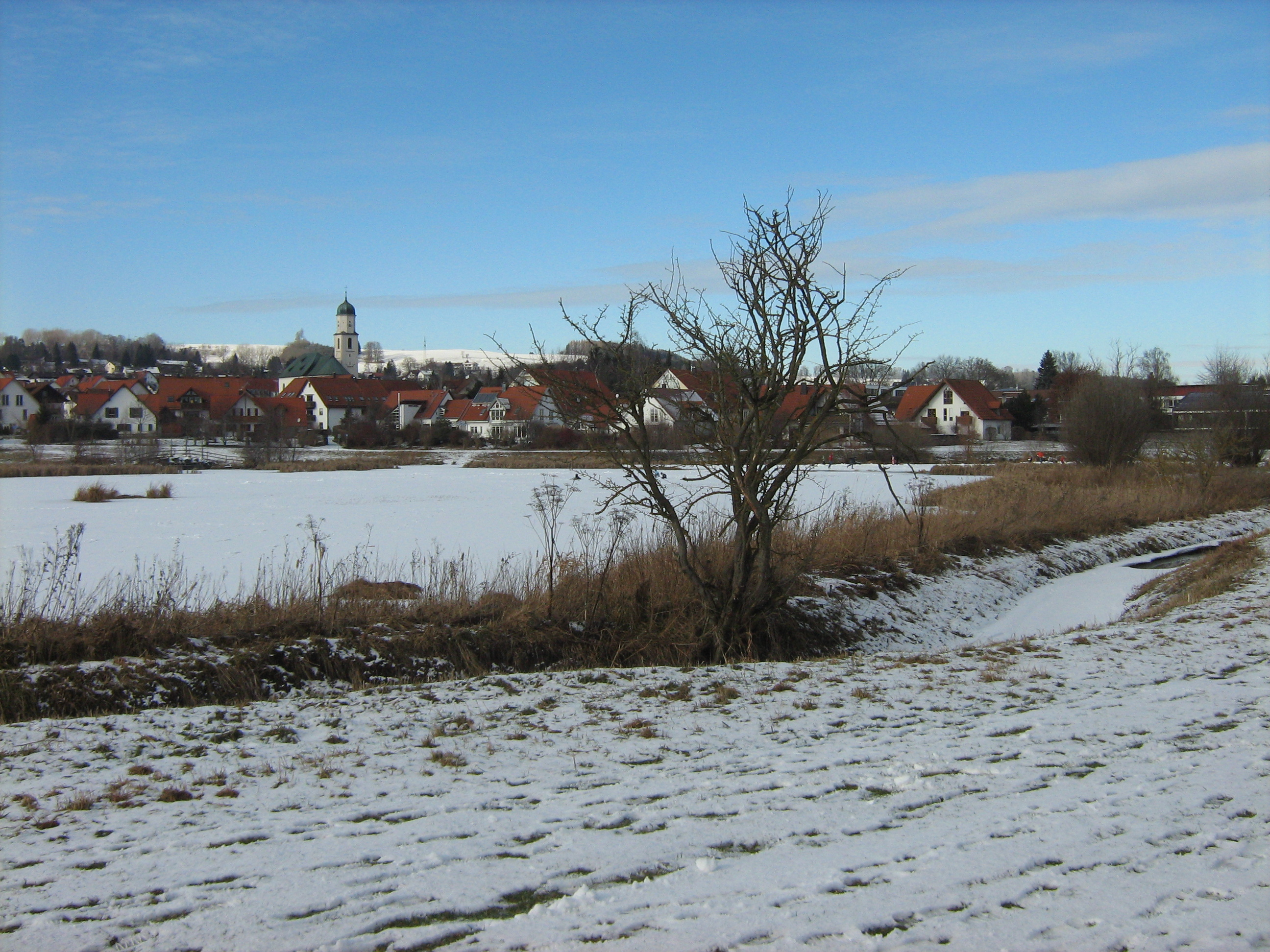 Oberbeuern vom Mösle